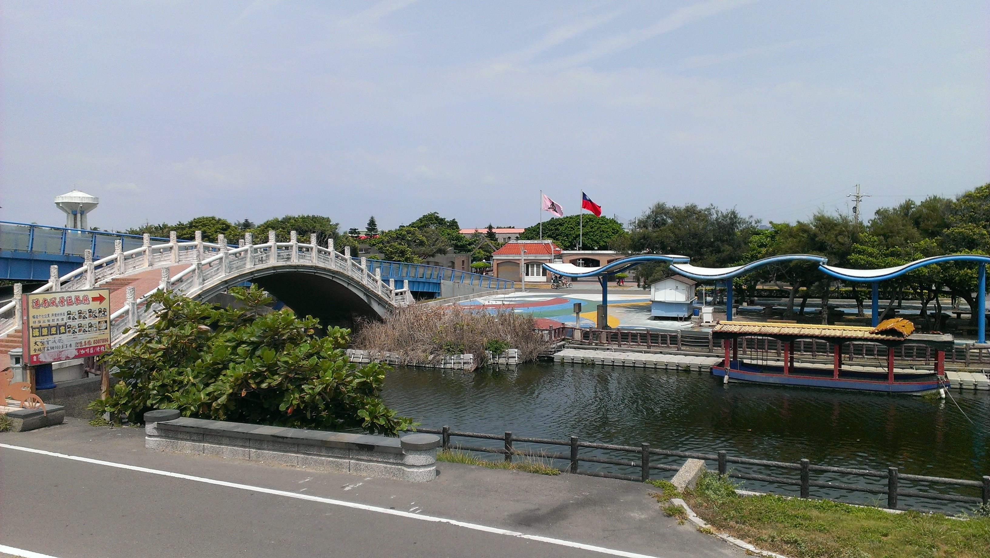 中文（台灣）: 港南運河拱形橋